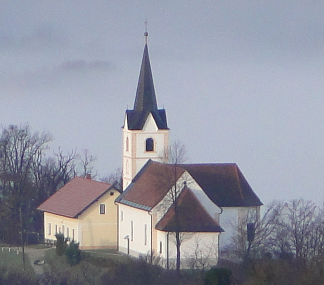 Pogled proti cerkvici Sv. Ana